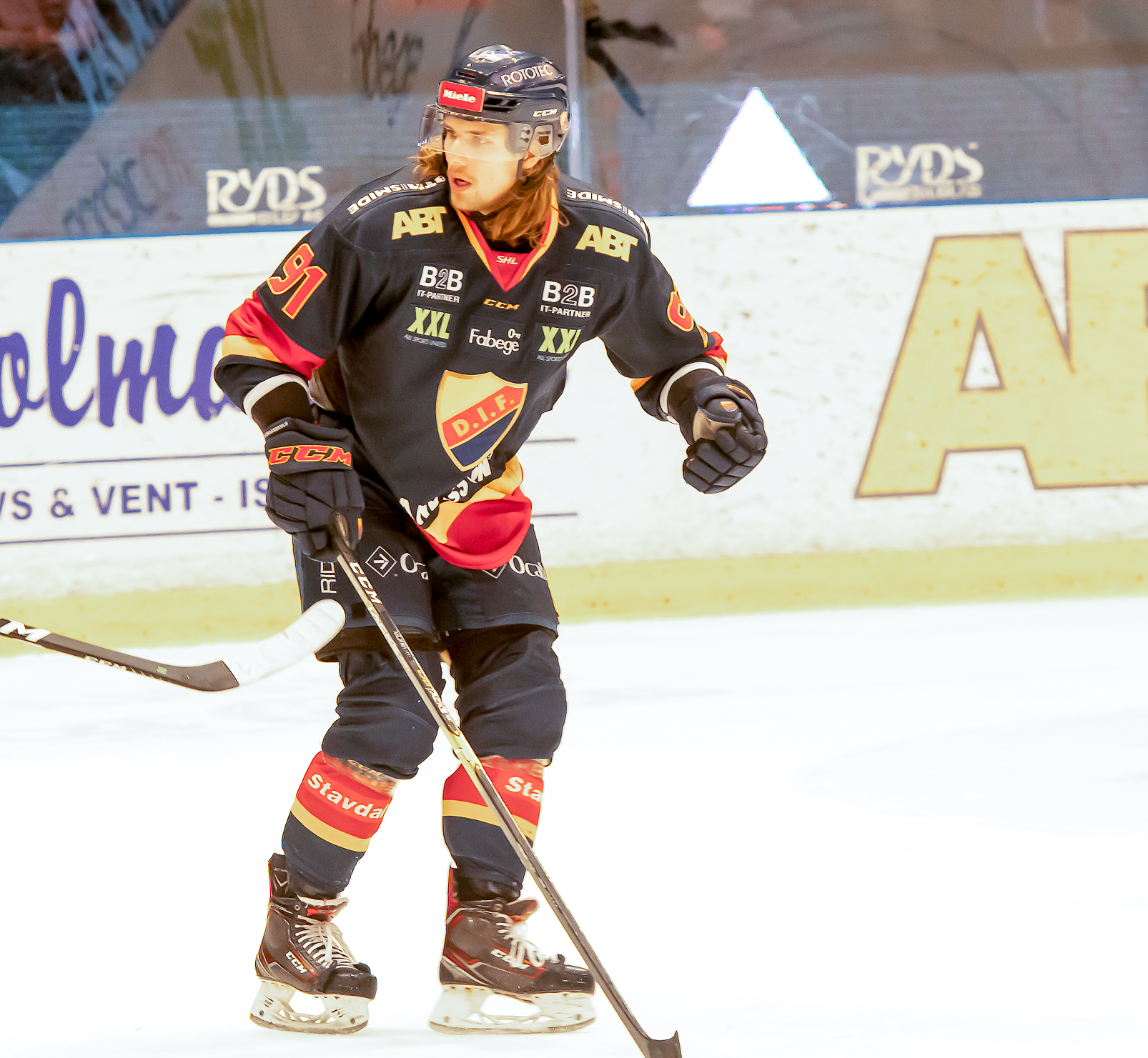 Djurgården-Färjestad 20190129